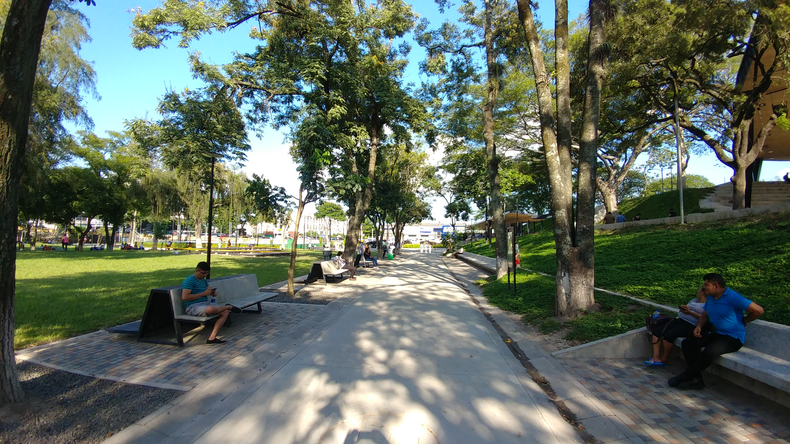 Senderos del parque Cuscatlán